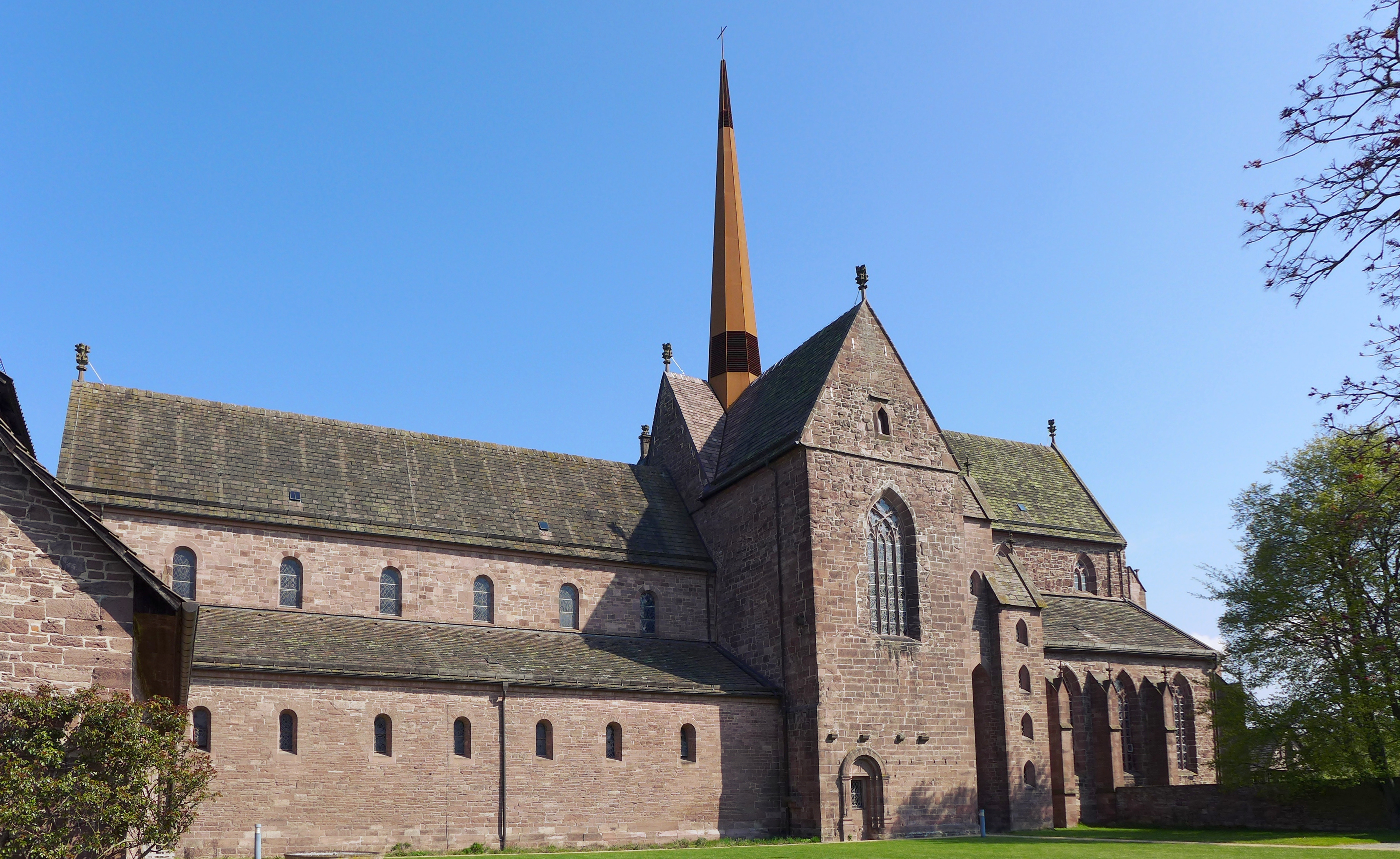 Klosterkirche Amelungsborn, Südwestansicht